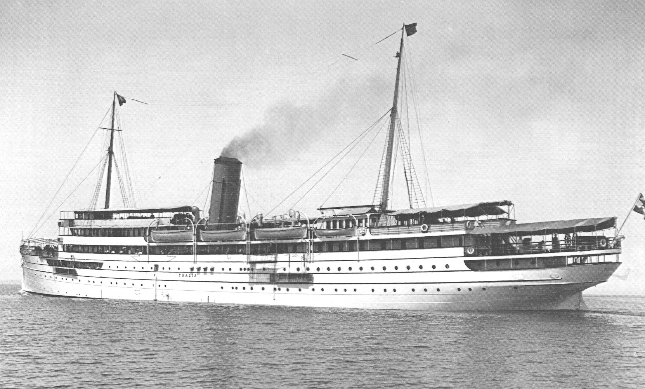 Vergnügungsdampfer des Österreichischen Lloyds: Thalia (2.330 t); 1886 in Dumbarton vom Stapel gelaufen.